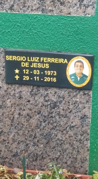 Identificação na sepultura no Cemitério Municipal de Chapecó